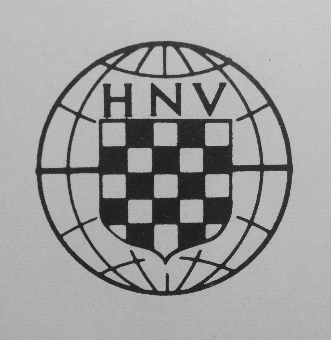 Amblem HNV